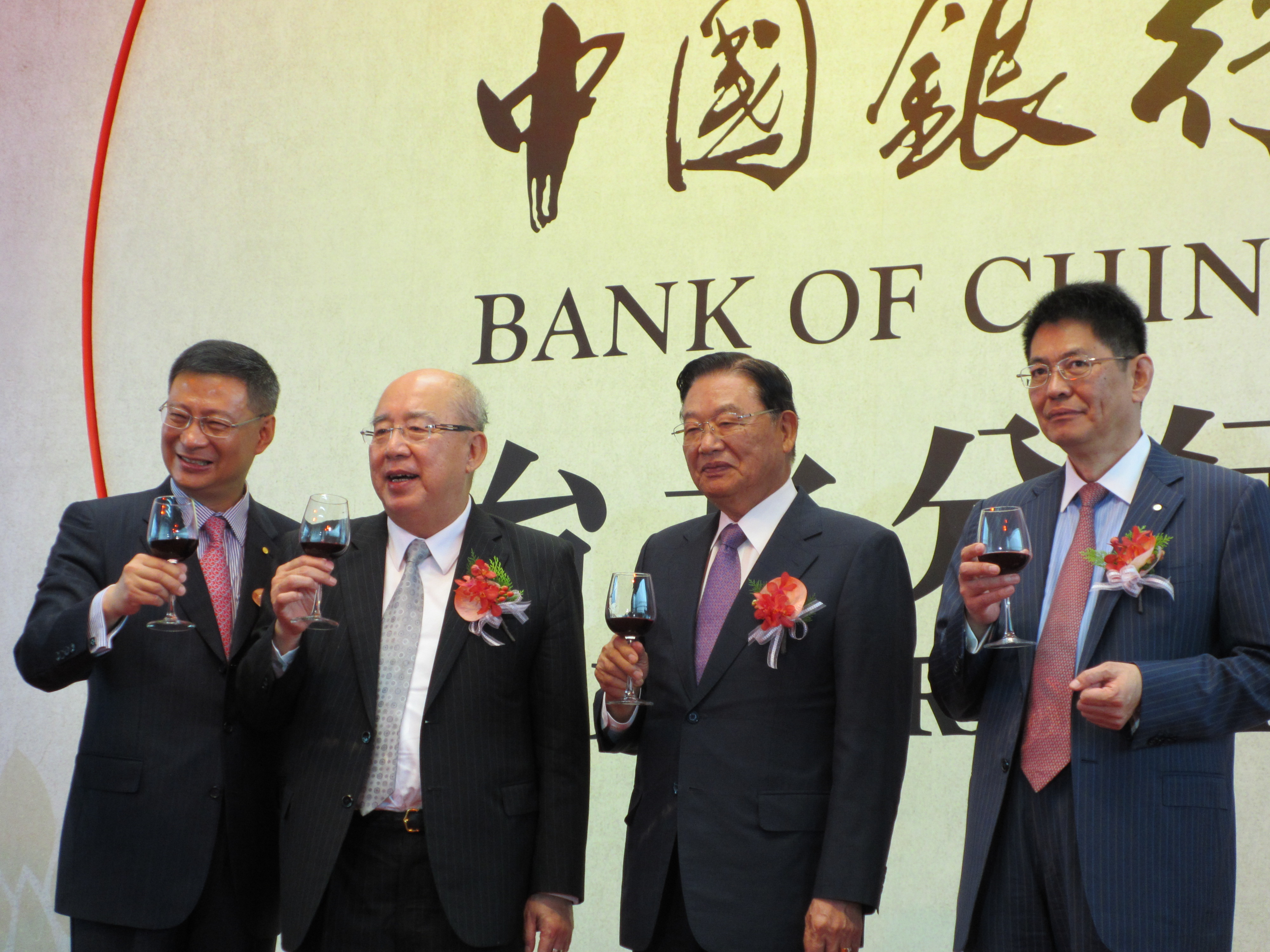 中國銀行台北分行開業儀式